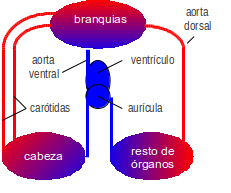 Esquema del aparato circulatorio de un pez.